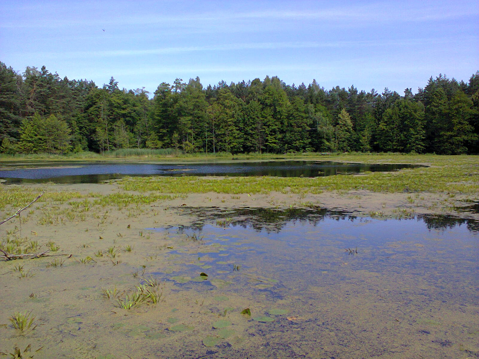 Huta żelaza w Wądołku - staw Wądołek